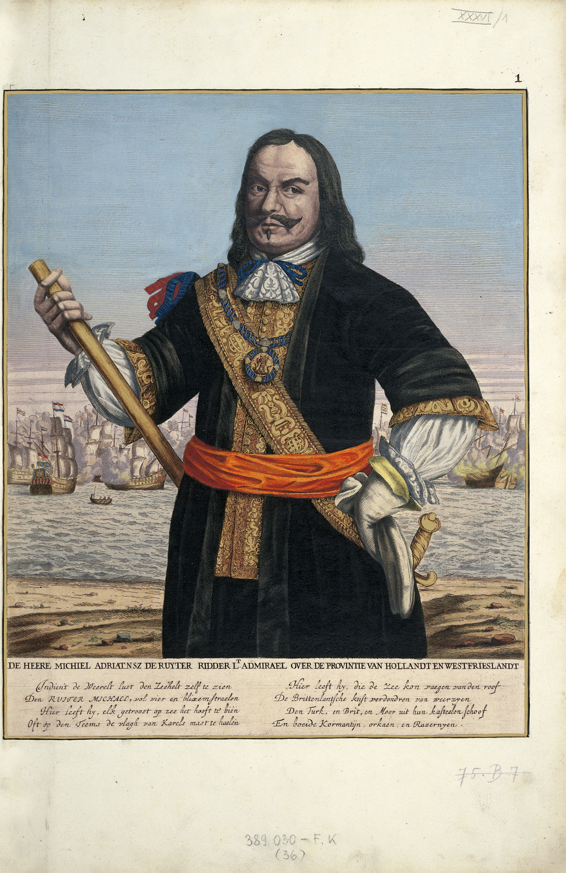 Die Heere Michiel Adriatnsz de Ruyter Ridder Lt. Admirael over de provintie van Hollandt en Westfrieslandt